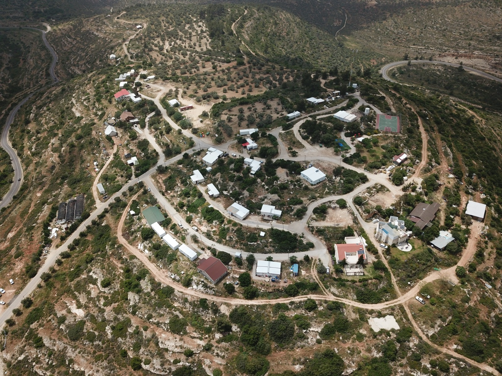 תצלום אווירי של שכונת זית רענן